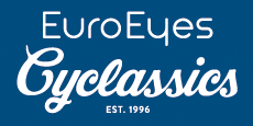 Offizielles EuroEyes Cyclassics Logo